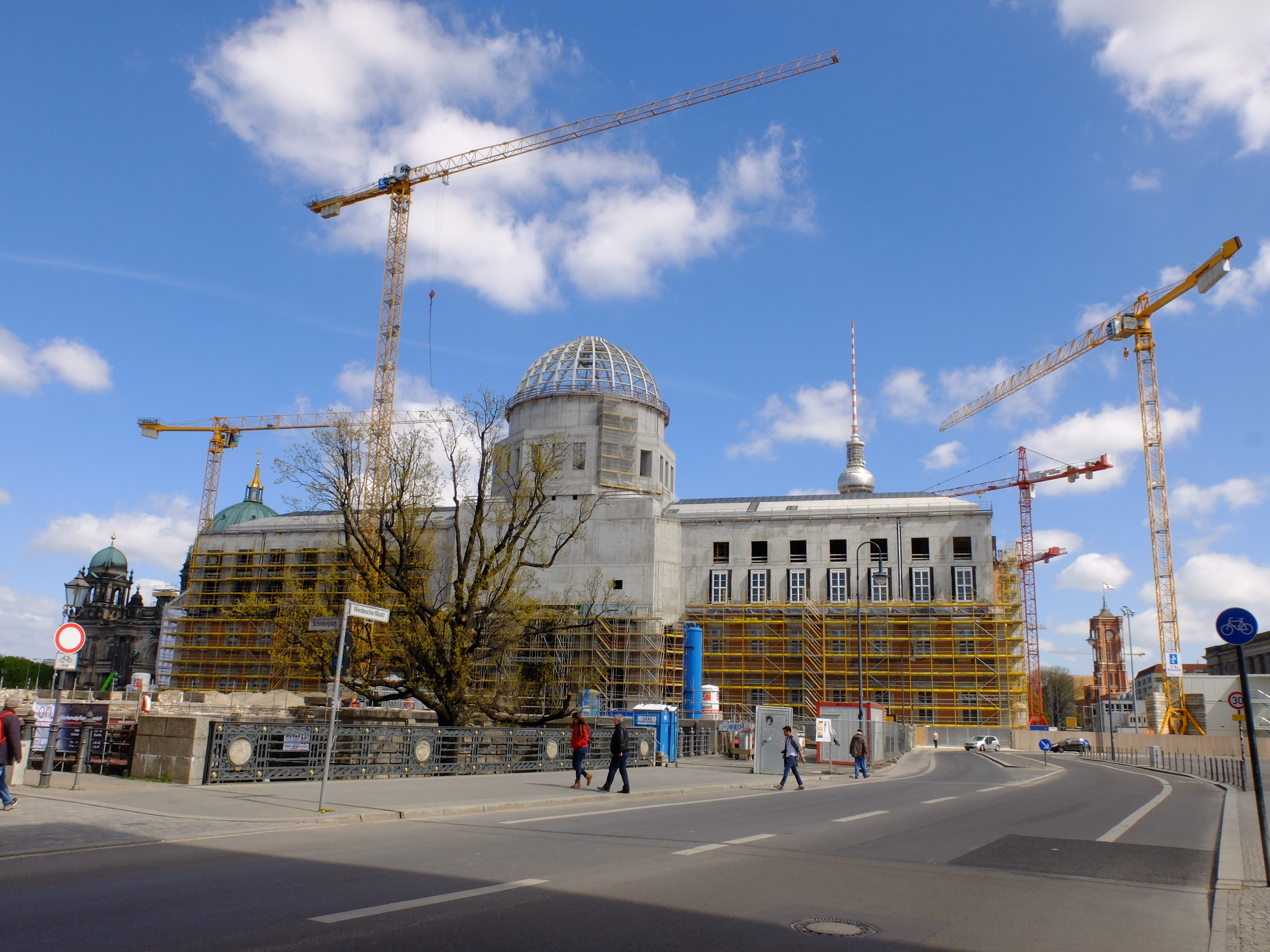 Humboldtforum in Berlin, im Bau